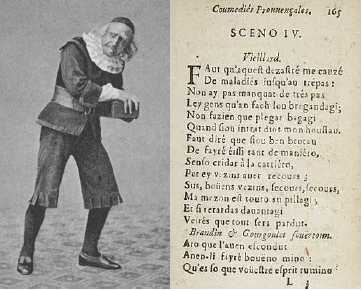 Combination de deux fichier de commons : et